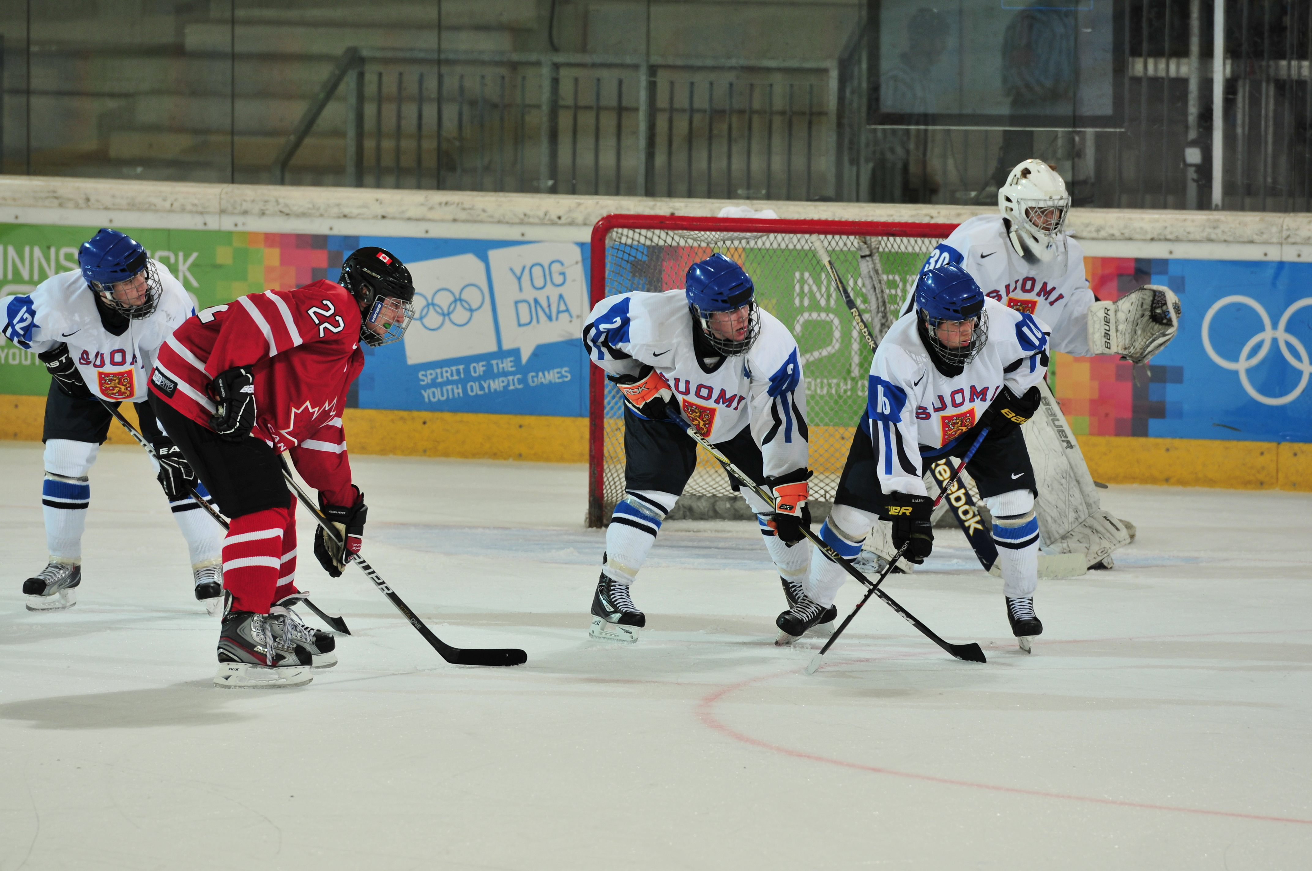 1. Jugendolympiade 2012 Innsbruck